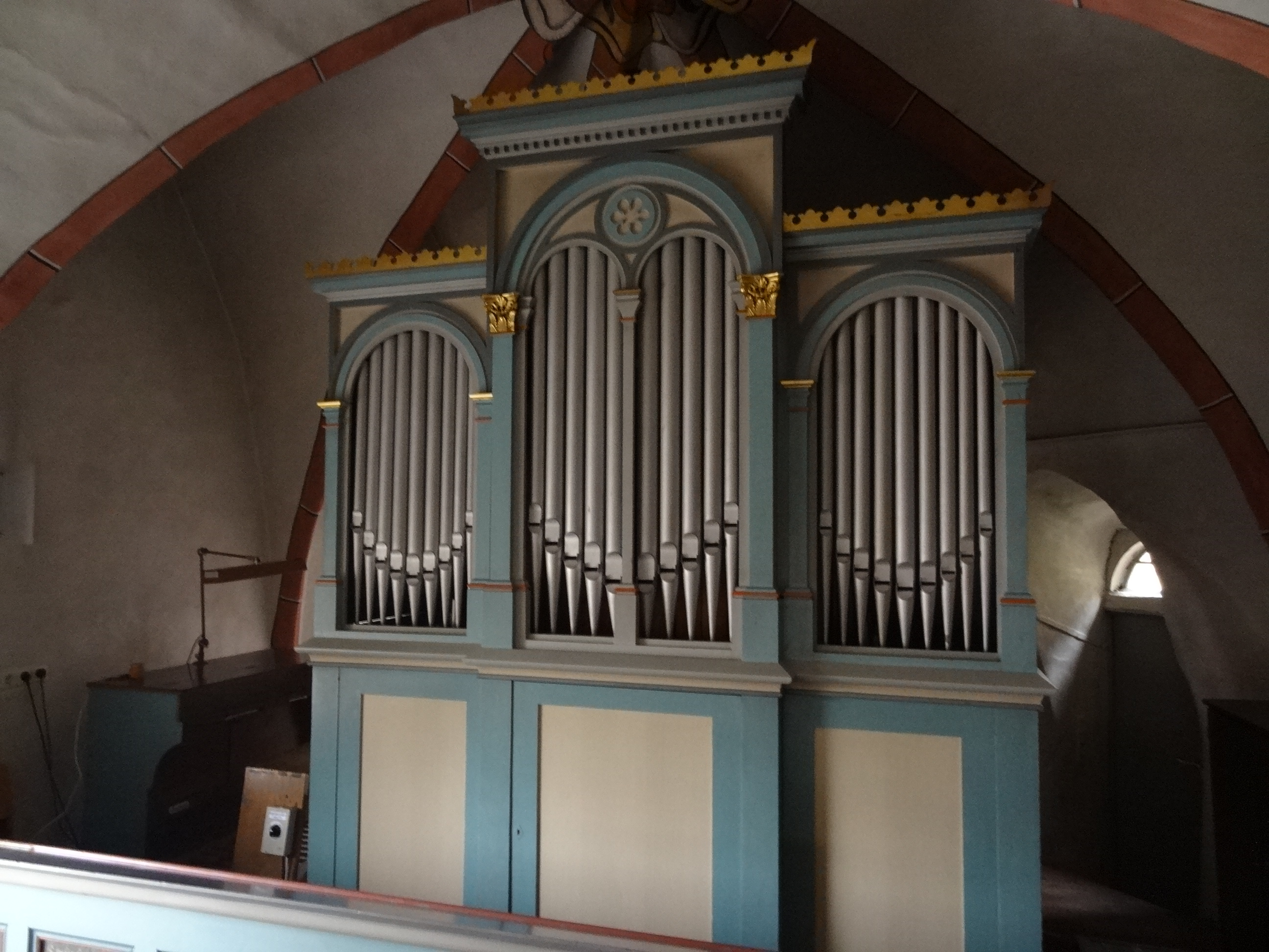 Evangelische Kirche Cleeberg